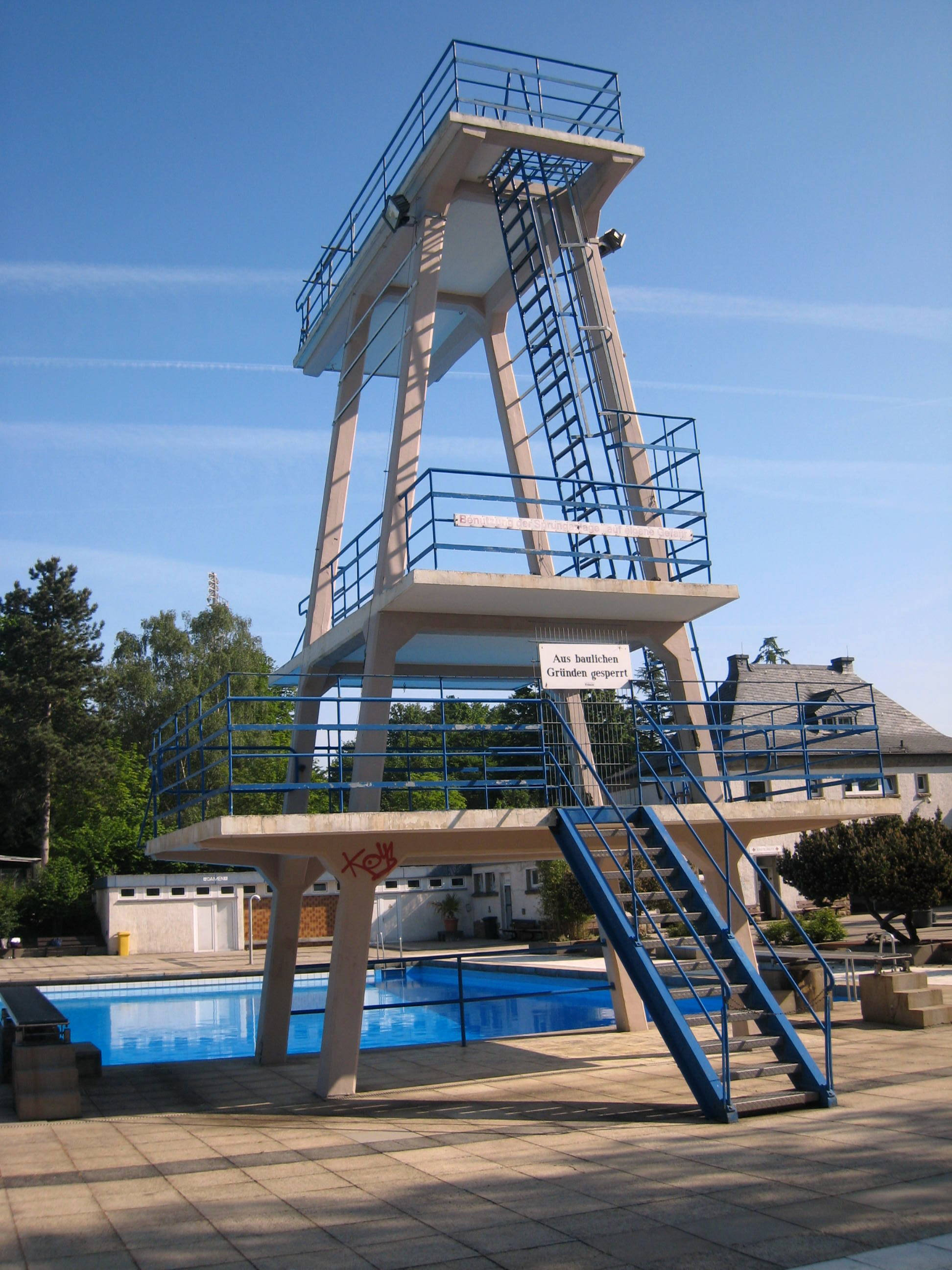 Schwimmbad Volkspark Dortmund